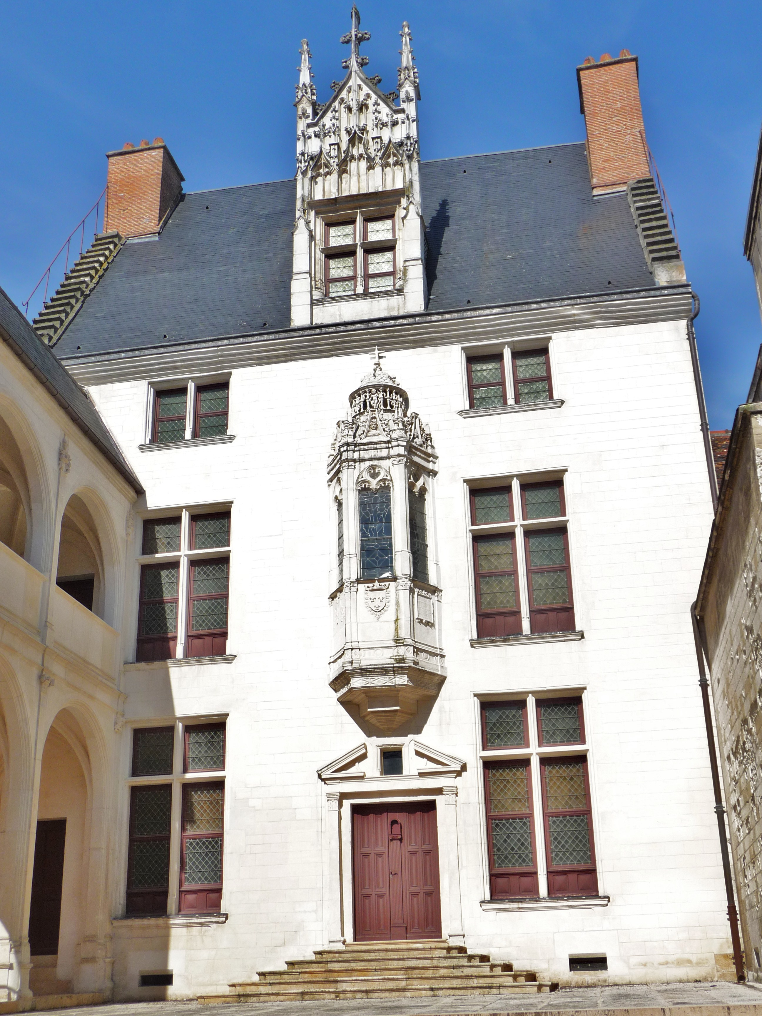 La façade .